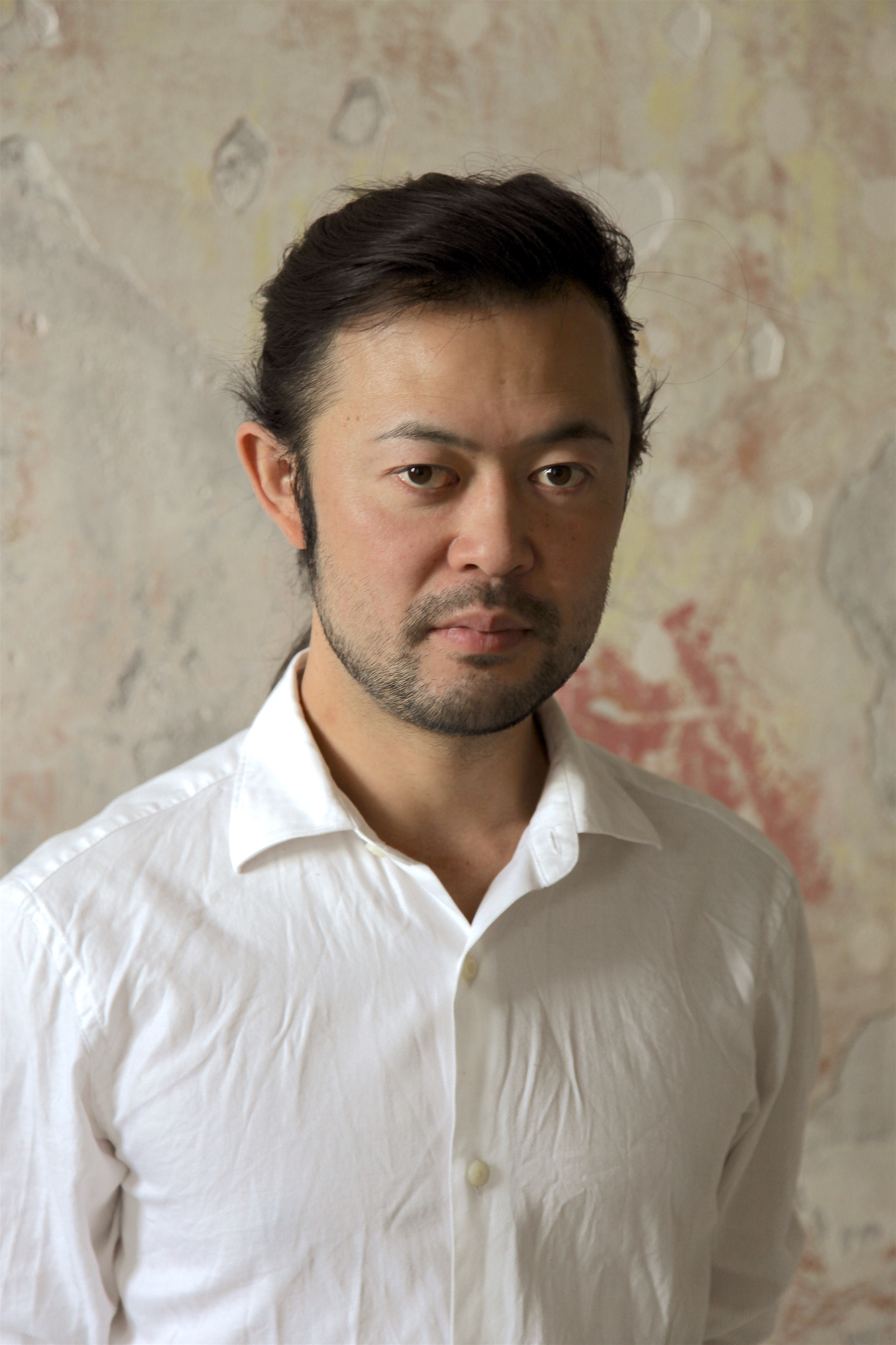 プロフィール